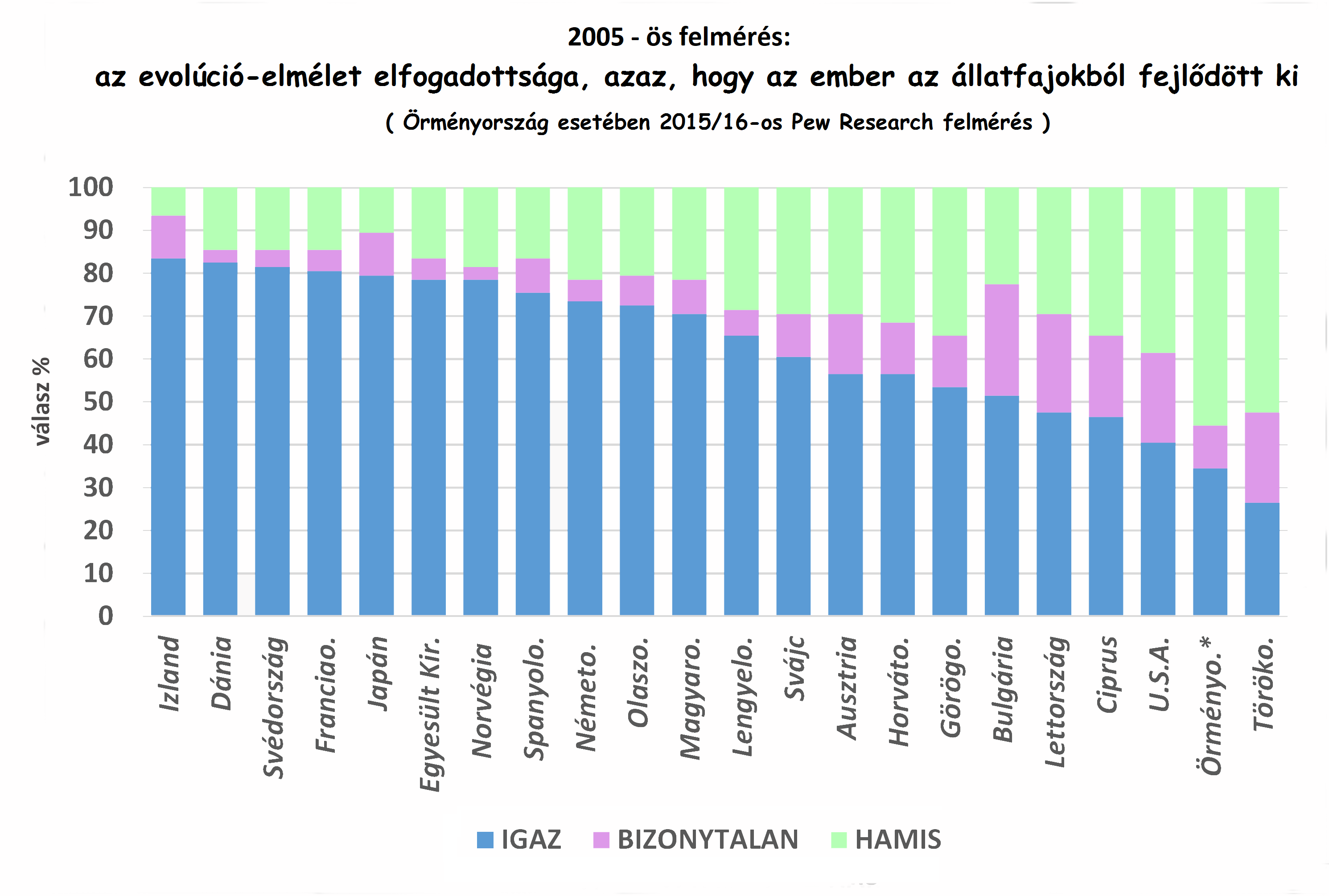 Felmérés az evolúcióról (2005): hisz benne vagy nem New Scientist Magazine, 19 August 2006, Vol. 191, No.2565, page 11: "Why doesn't America believe in evolution?" SCIENCE COMMUNICATION, Policy Forum 21 Jan 2012, : "Public Acceptance of Evolution" PEW Research acceptance of evolution